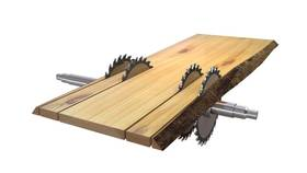 Schnittprinzip Doppelsäumer